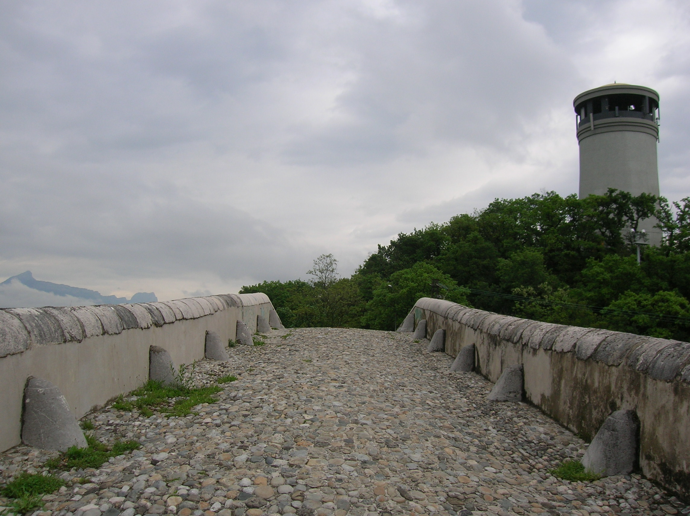 Pont Lesdiguières, Claix